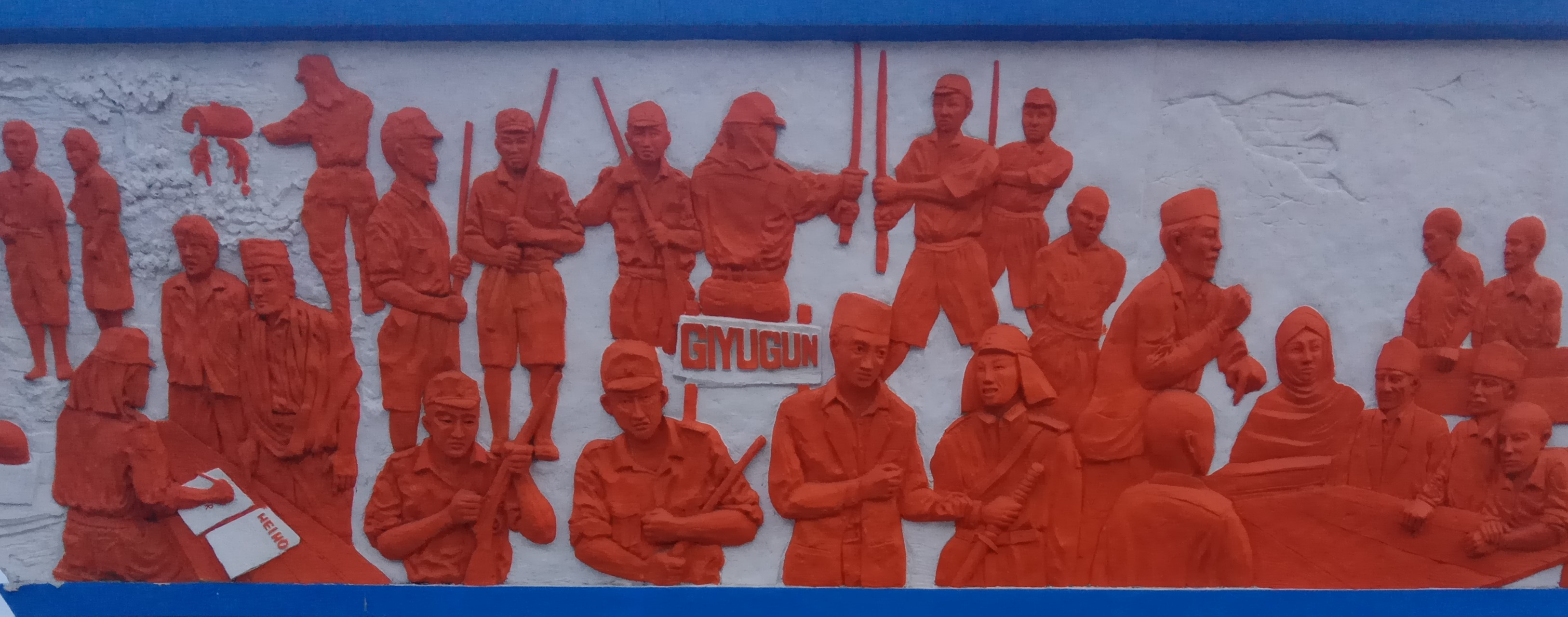 Dekorasi di Tugu Simpang Haru